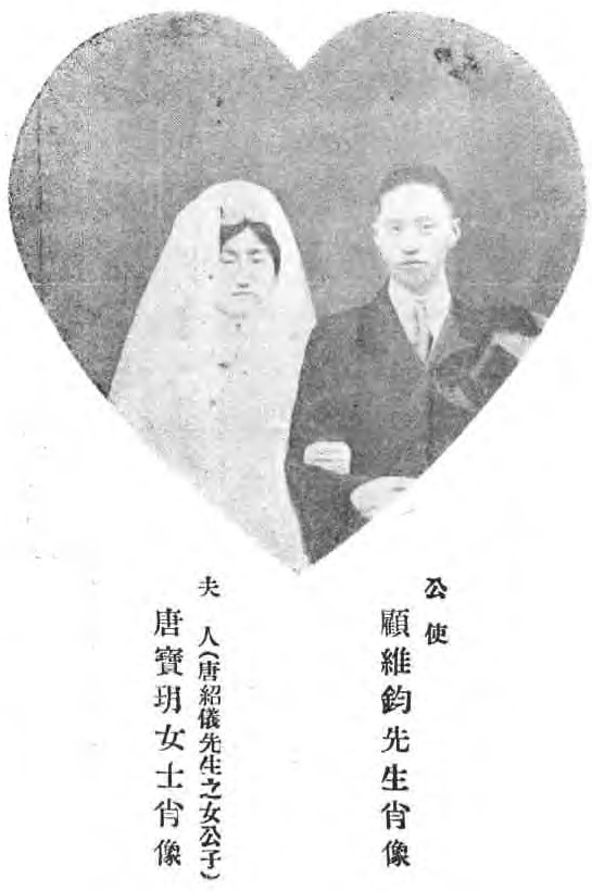 治家全書圖像